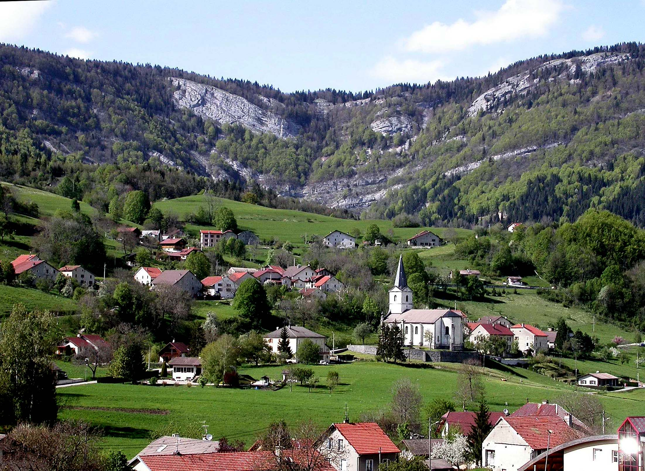 Champfromier : le village et le synclinal en arrière plan